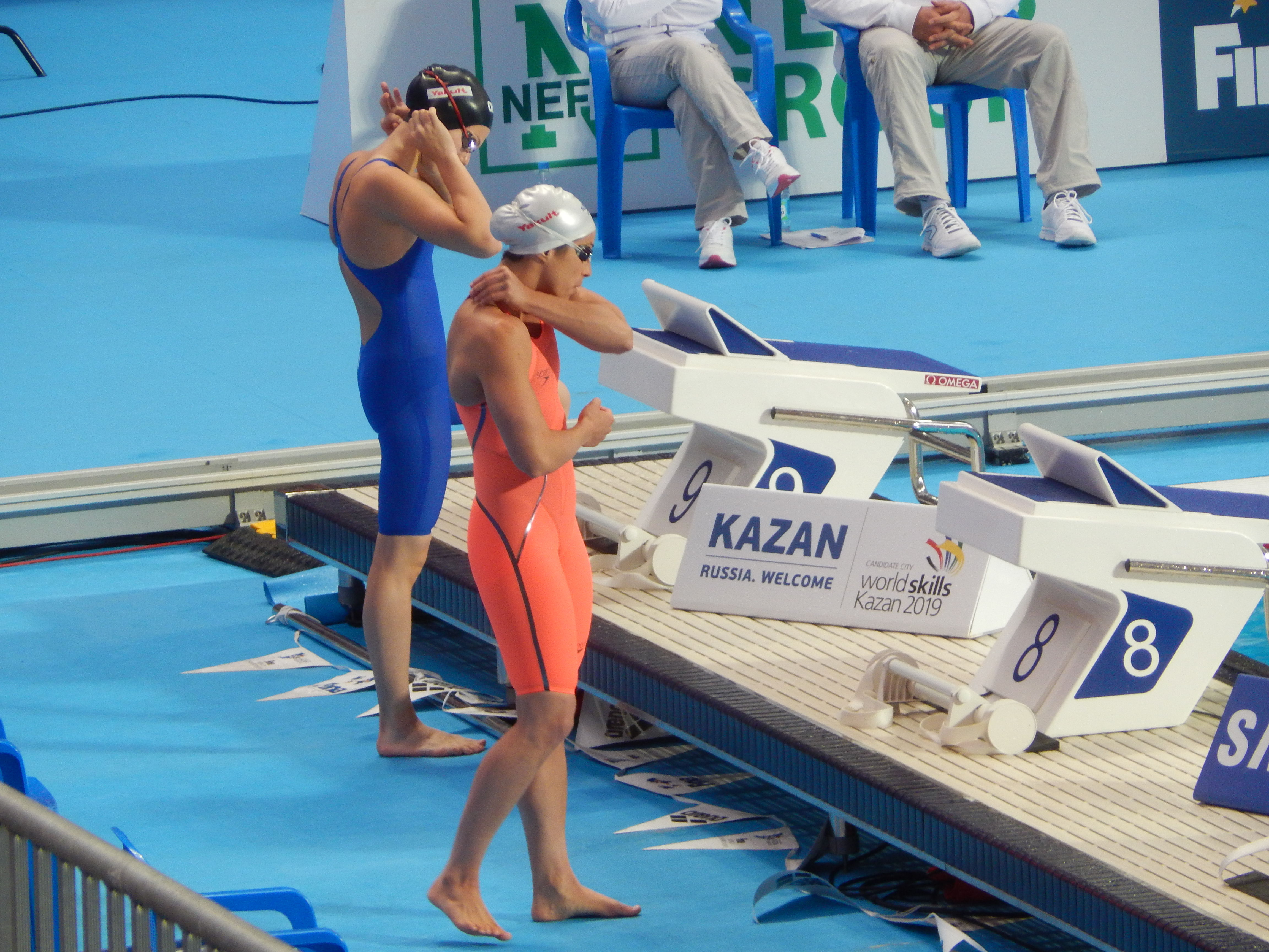 Амит Иври и Мария Асташкина в Казани на чемпионате мира по плаванию